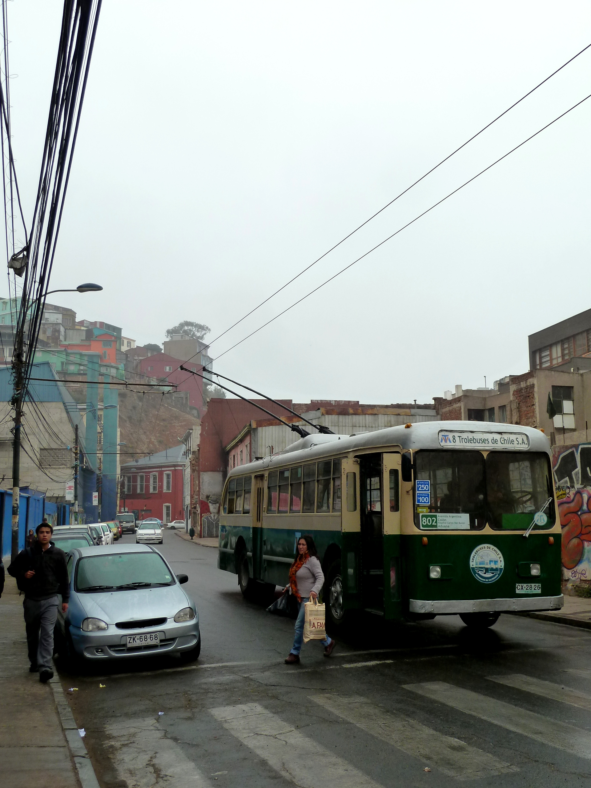 con aduana de Valparaiso This is a photo of a national monument in Chile: 2010